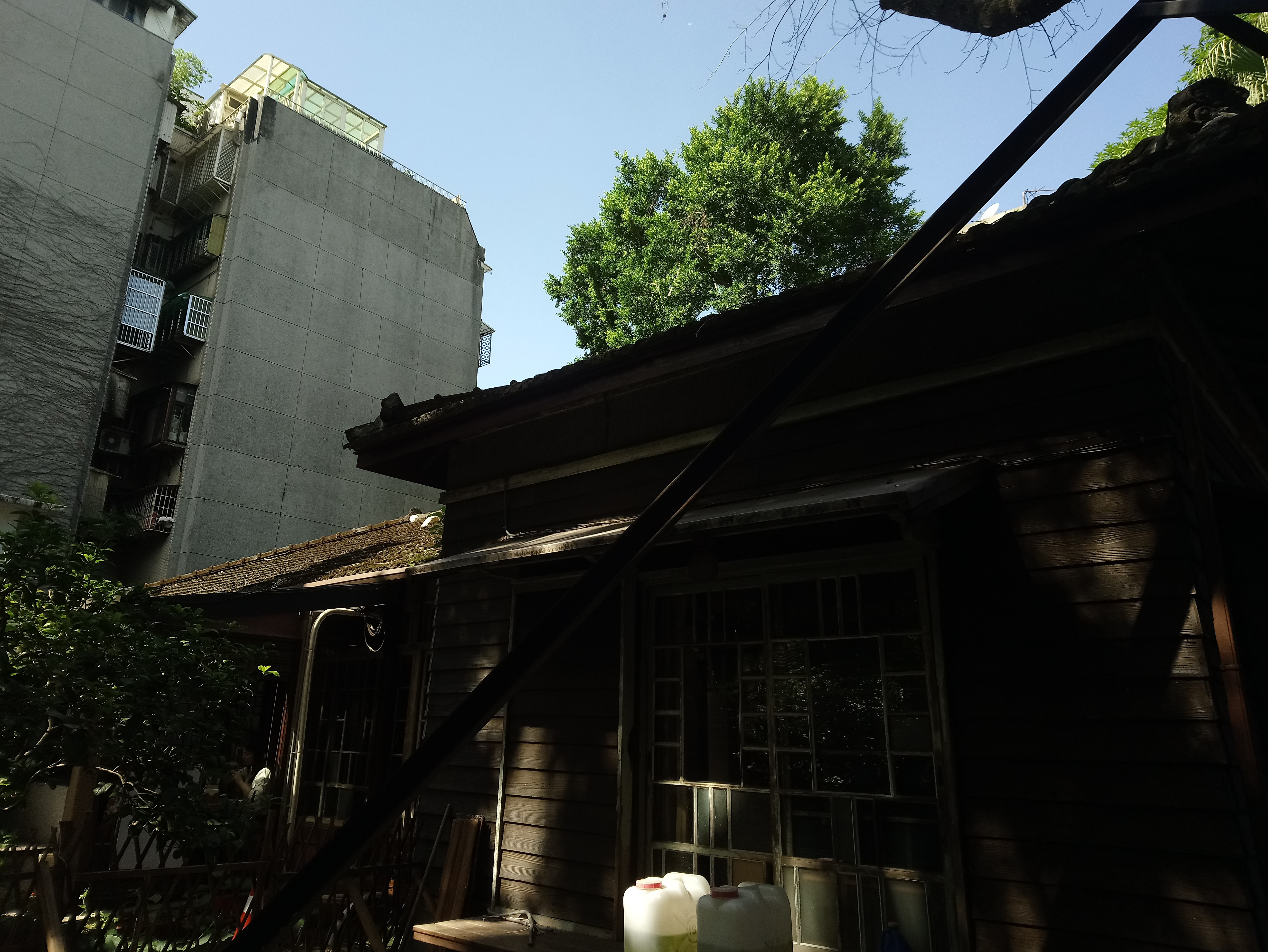 國立臺灣大學日式宿舍馬廷英故居,台北市大安區和平次分區龍安里